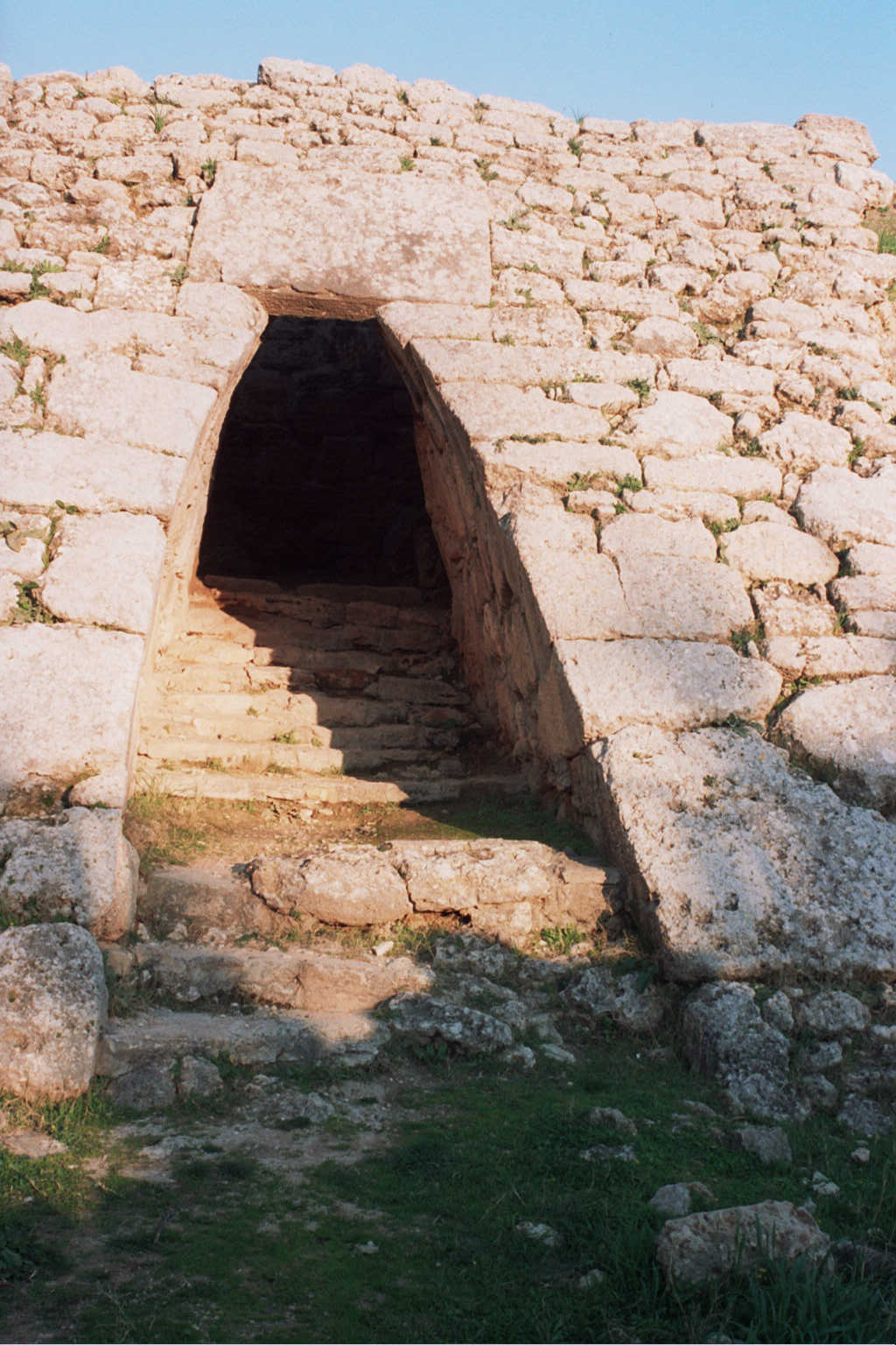 Loris Romito fecit - marzo 2005